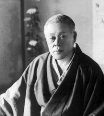 昭和十四年十一月二十日。還暦の日。